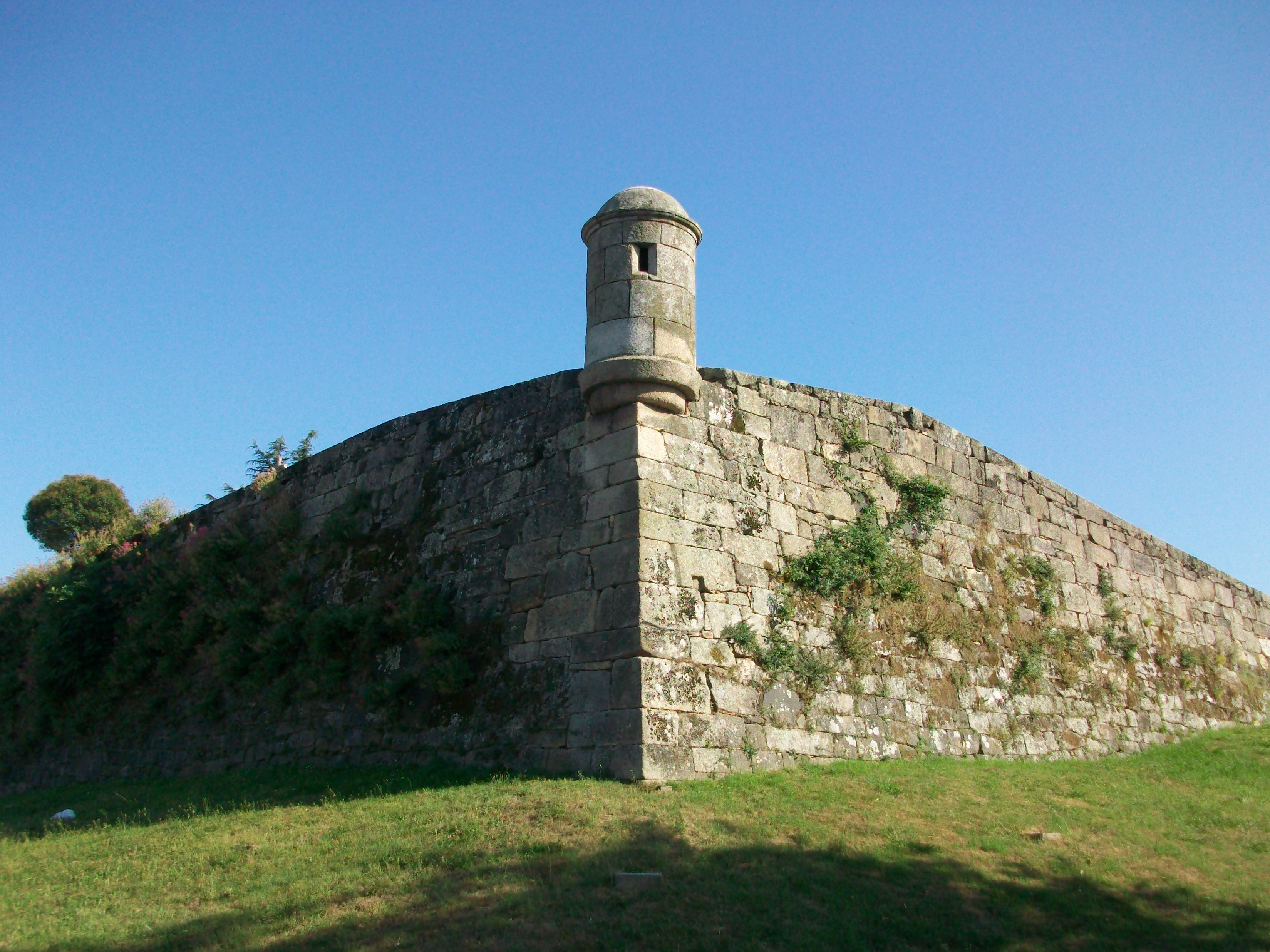 Vigo, fortaleza de San Sebastián, muralla